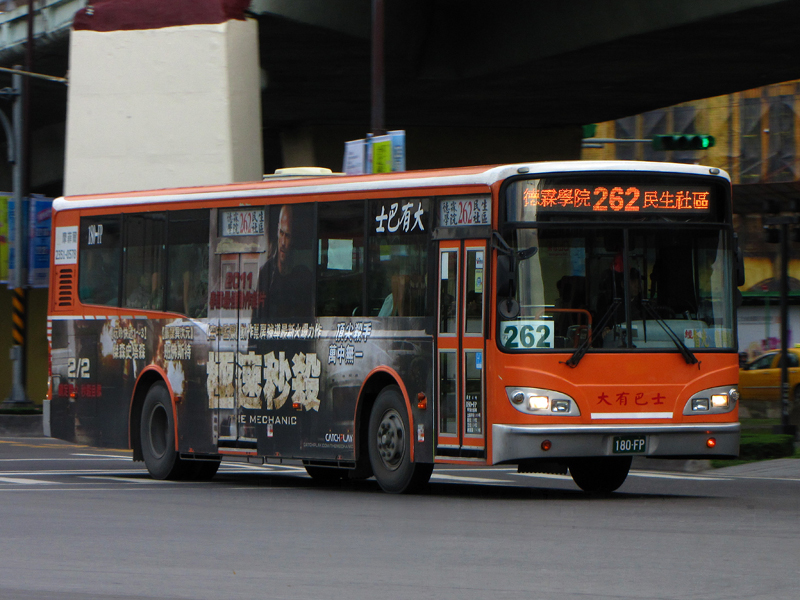 中文（台灣）: 大有巴士五十鈴LT134PMK大客車180-FP。